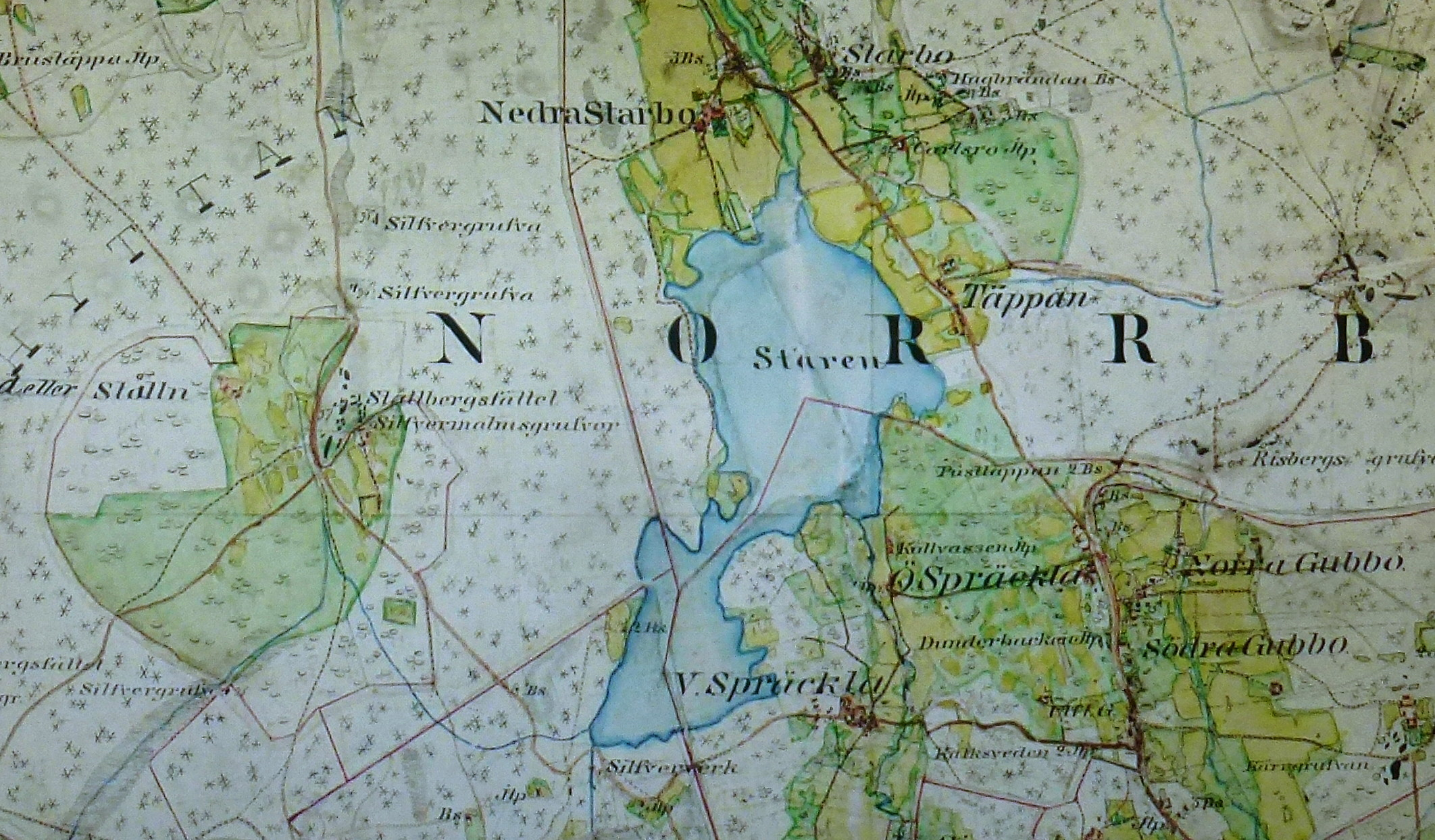 Stollbergs gruva med omgivning, häradskarta från 1867